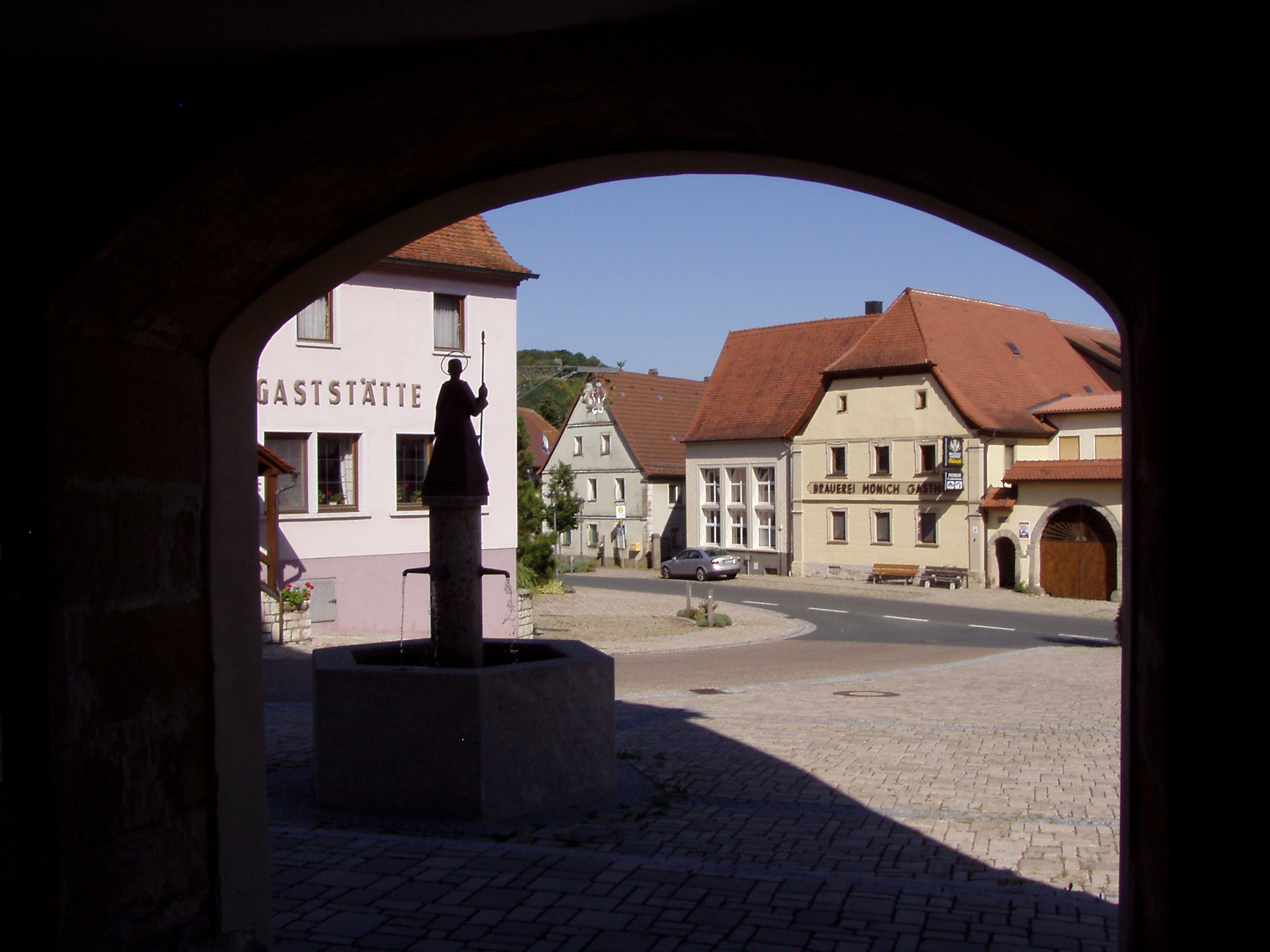 Marktplatz von Oberscheinfeld im Steigerwald